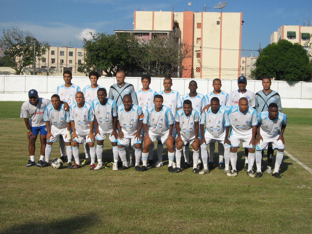 Equipe profissional do Céres Futebol Clube, da Série B do Rio de Janeiro.